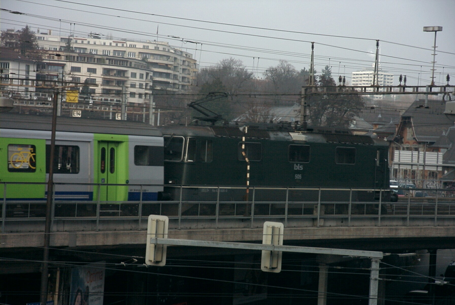 BLS Re 420 505 mit EW3-Pendel in Bern